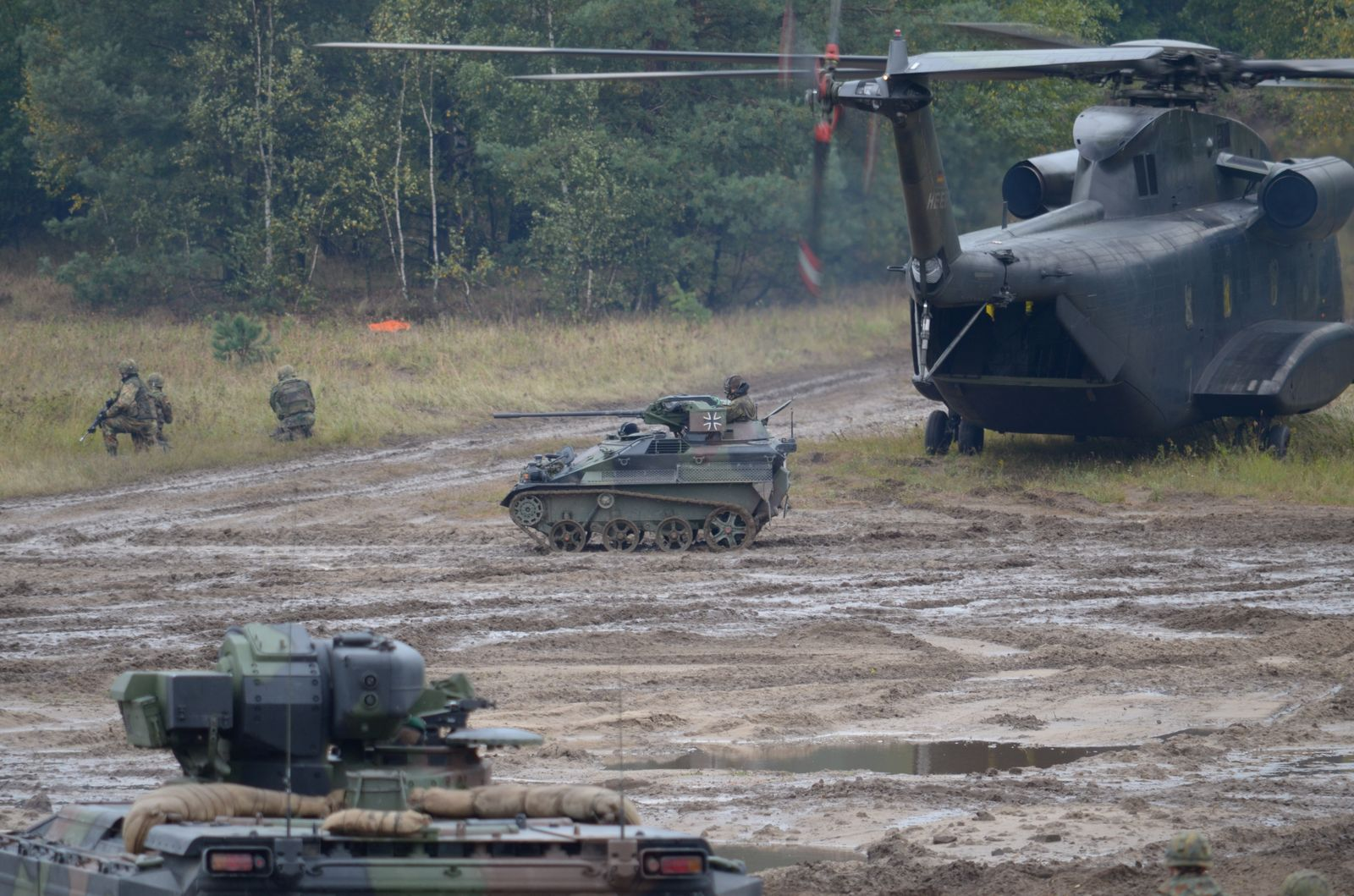 Eindrücke von der ILÜ 2012 der BW 24.09.2012)